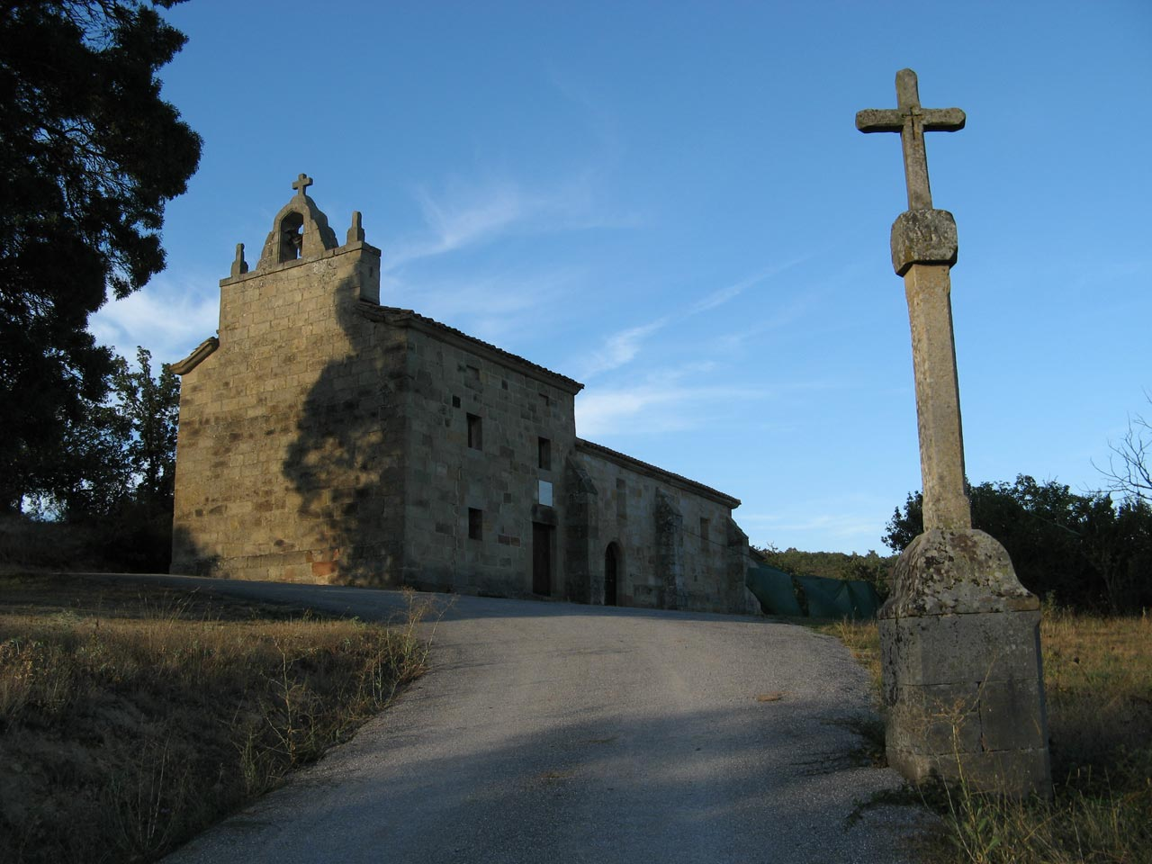 Ermita de la Virgen del Monte